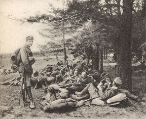 Legiony Polskie. Odpoczynek.